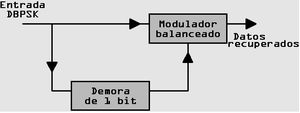 figura0003